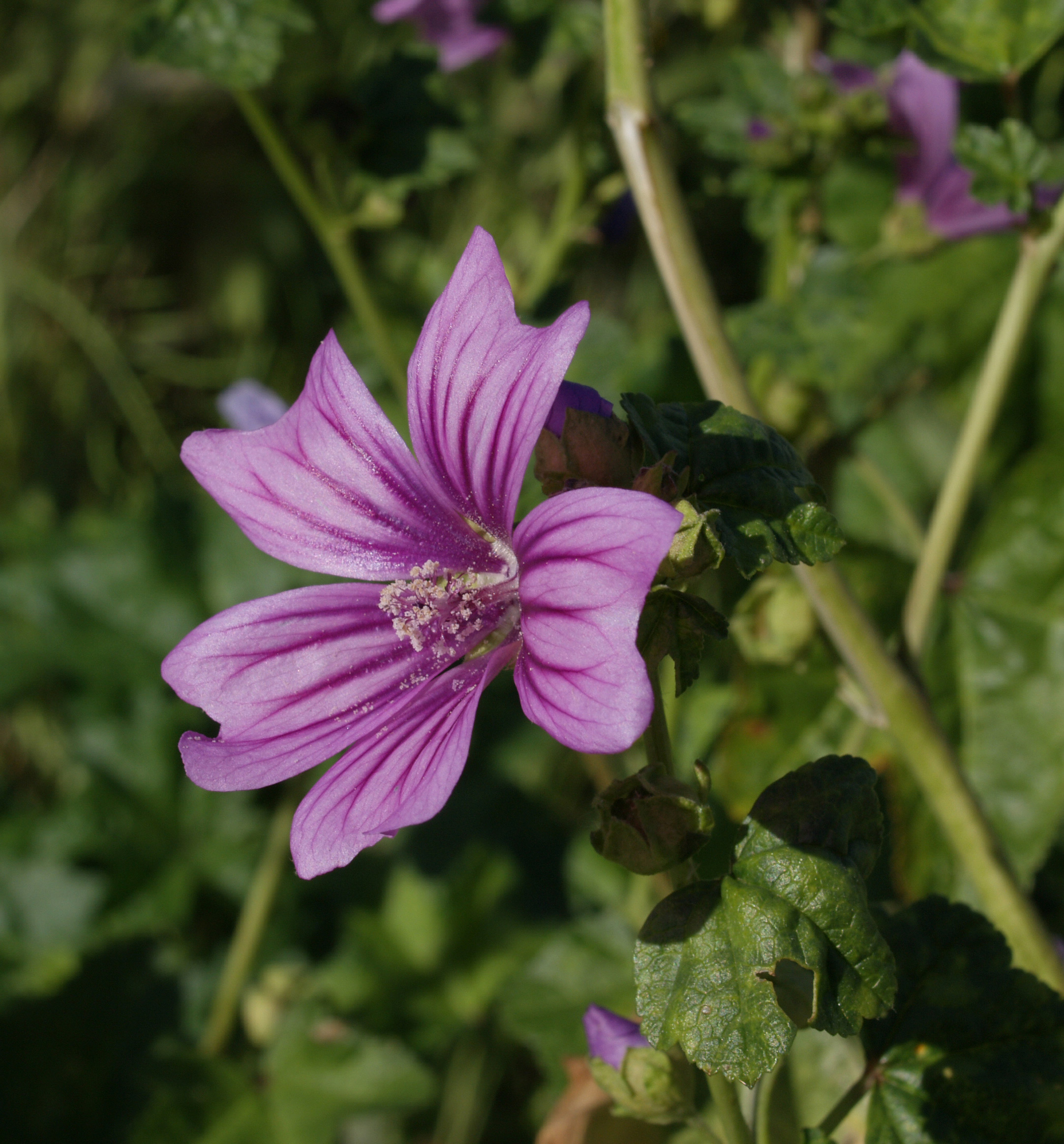 Malva sylvestris. Madrid, barrio de Peñagrande.